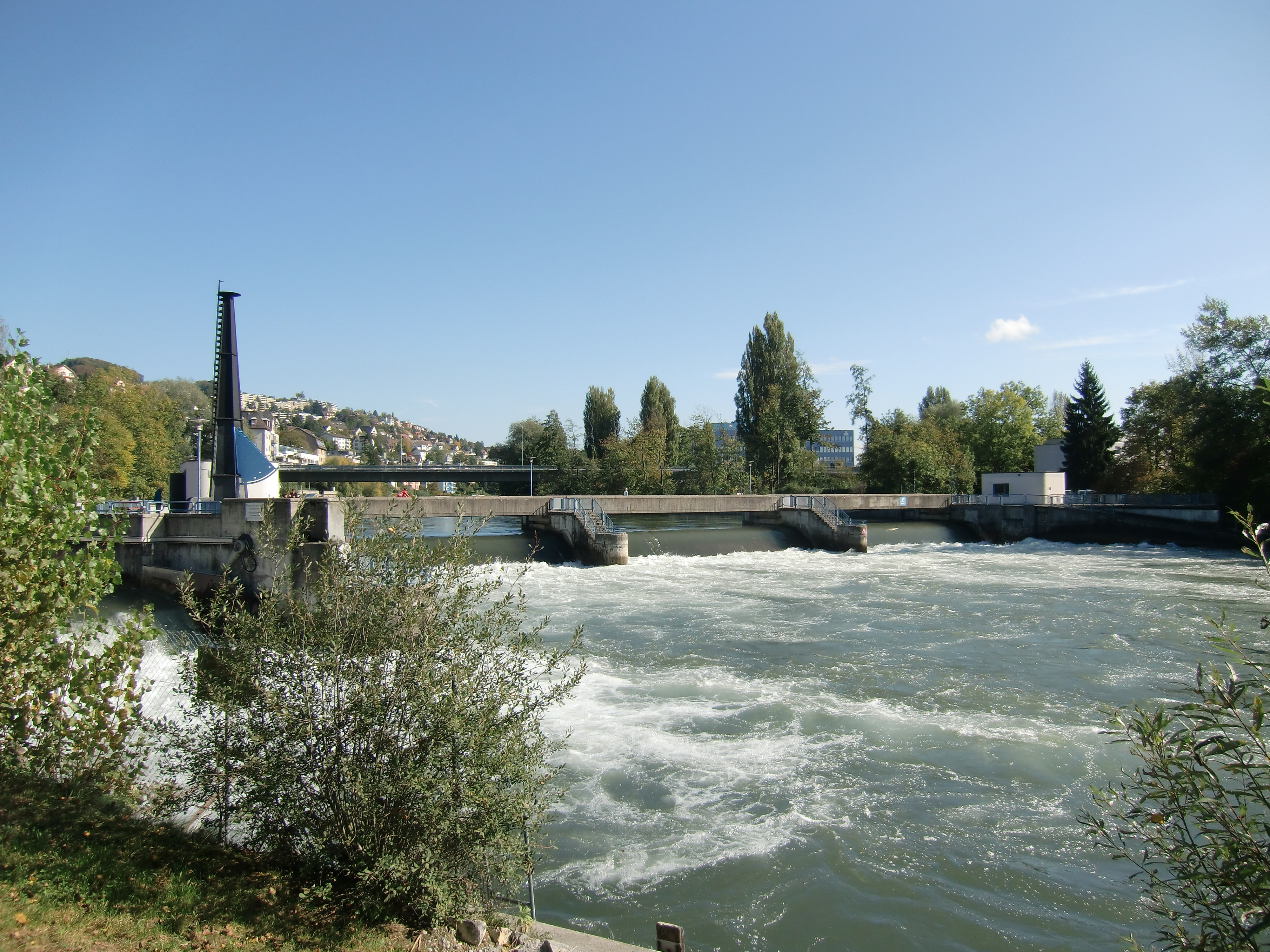 Das Wehr in Höngg bei Hochwasser, Herbst 2011